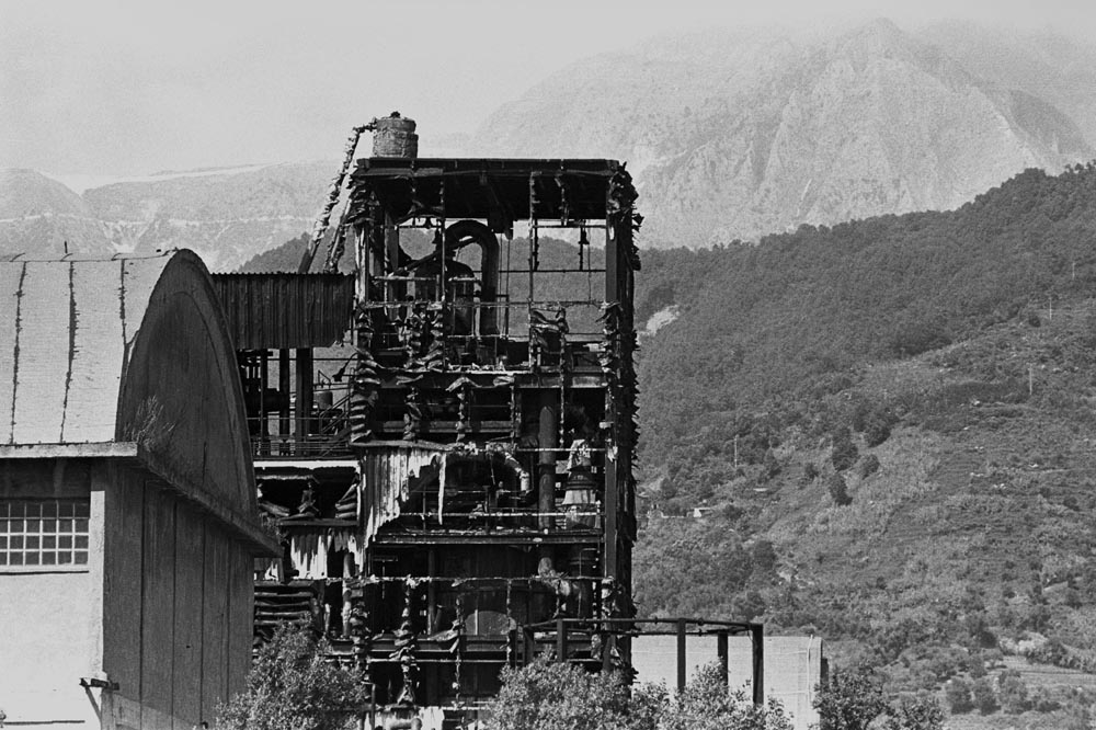 Il 17 luglio 1988 un incendio divampa nel dipartimento Rogor dello stabilimento Farmoplant di Massa (MS)